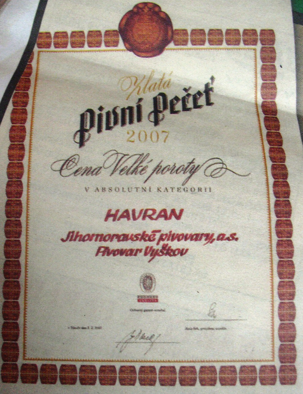 Zlatá pivní pečeť 2007 (Vyškov- czech republic)